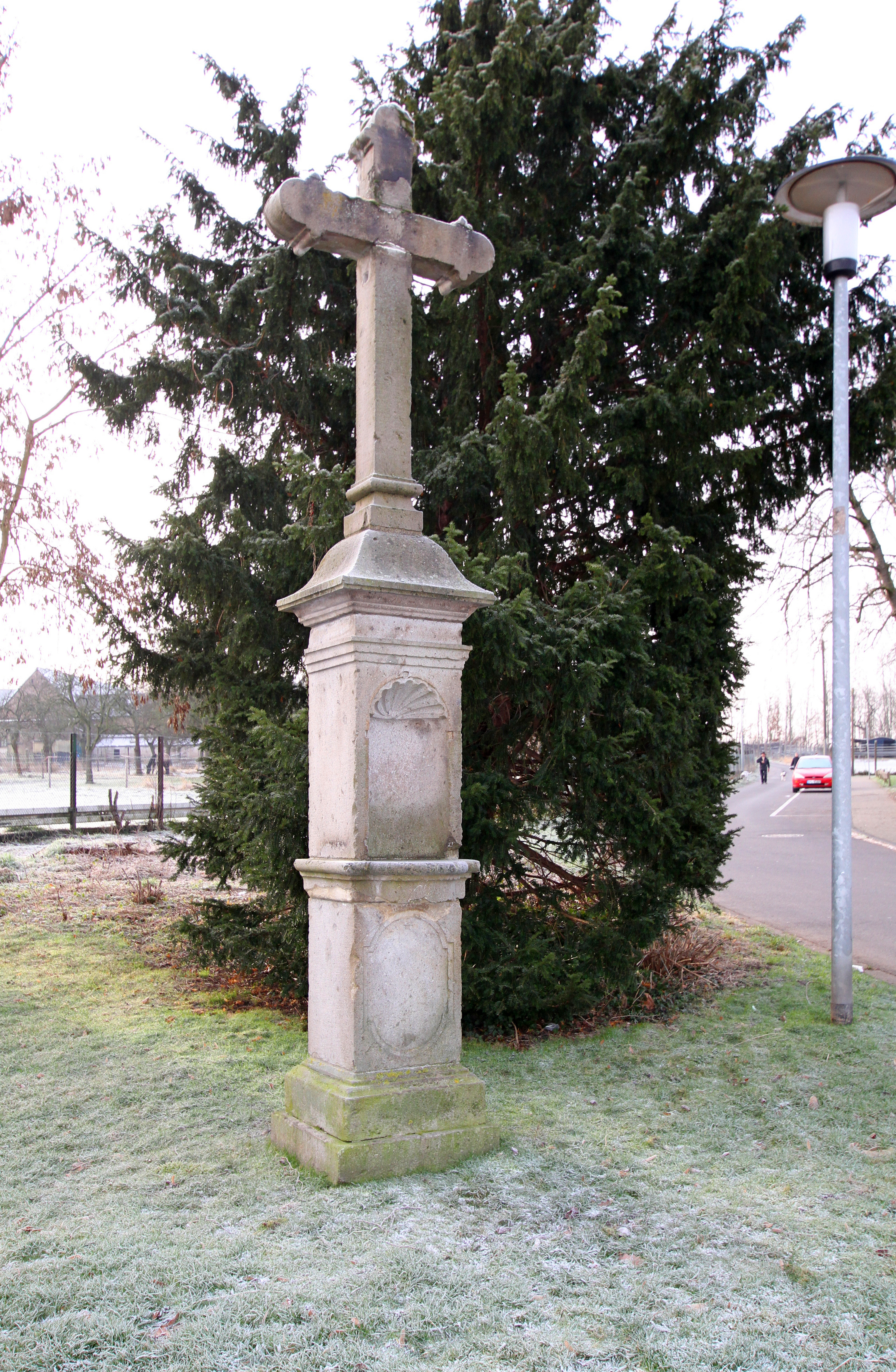 Hürth-Gleuel, denkmalgeschützte Objekte der Stadt Hürth